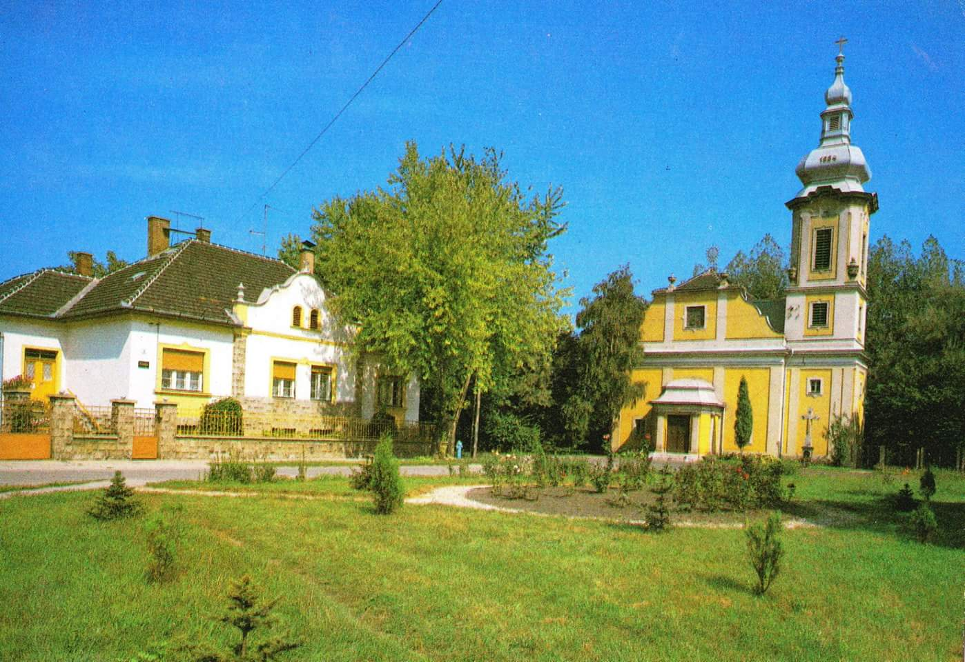 hejőcsabai templom